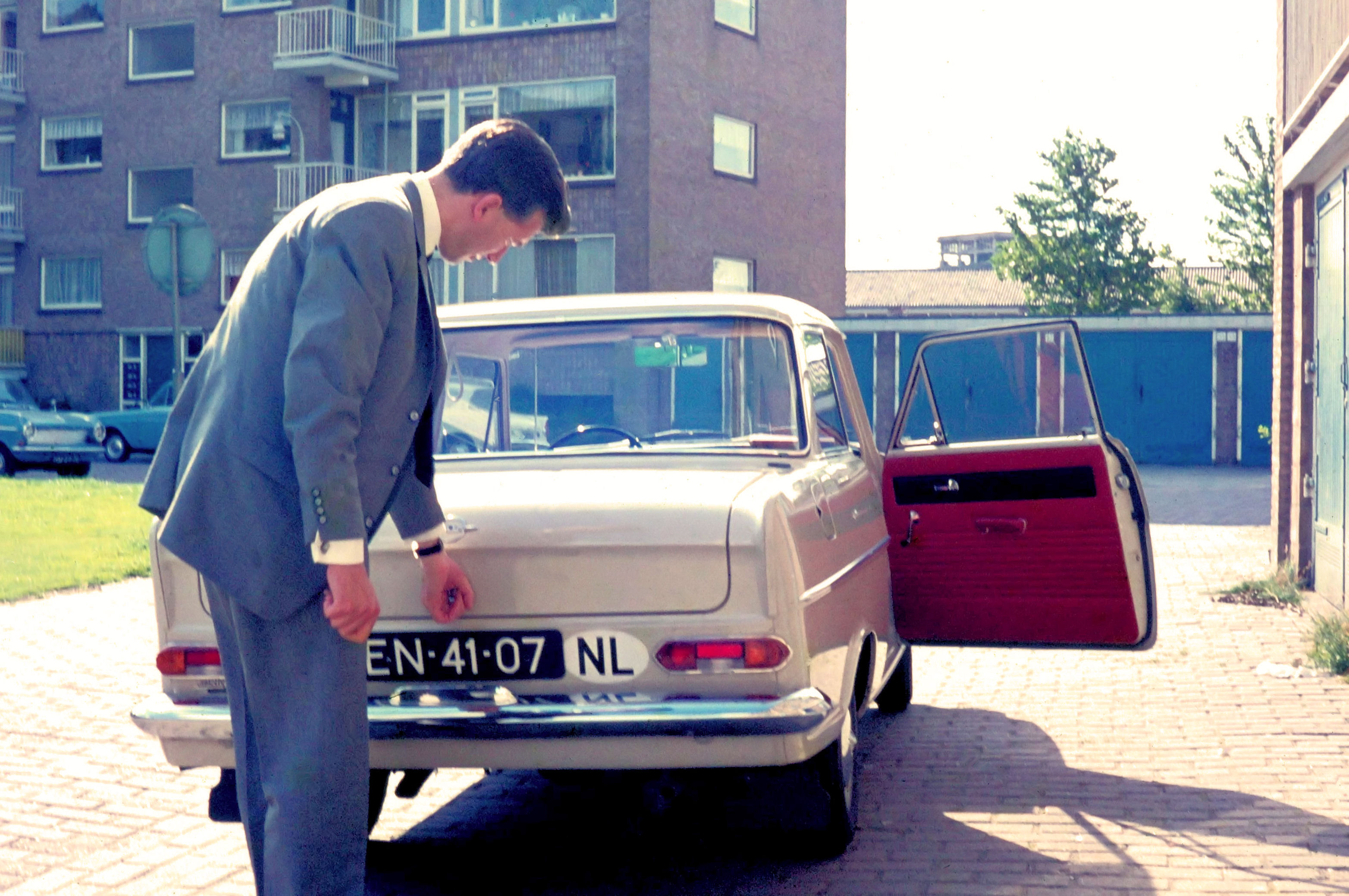 Opel Kadett A, gefotografeerd in 1965, Robijnhorst, Den Haag, Nederland